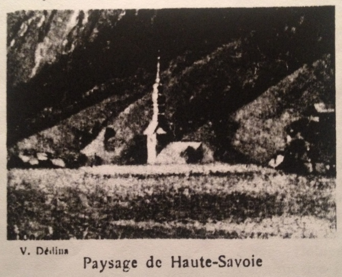 Paysage de Haute-Savoie par Venceslas Dedina